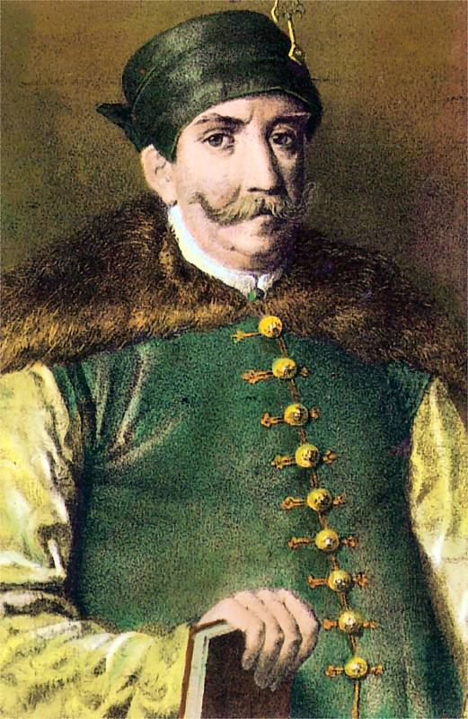 Hetman wielki litewski Krzysztof Radziwiłł